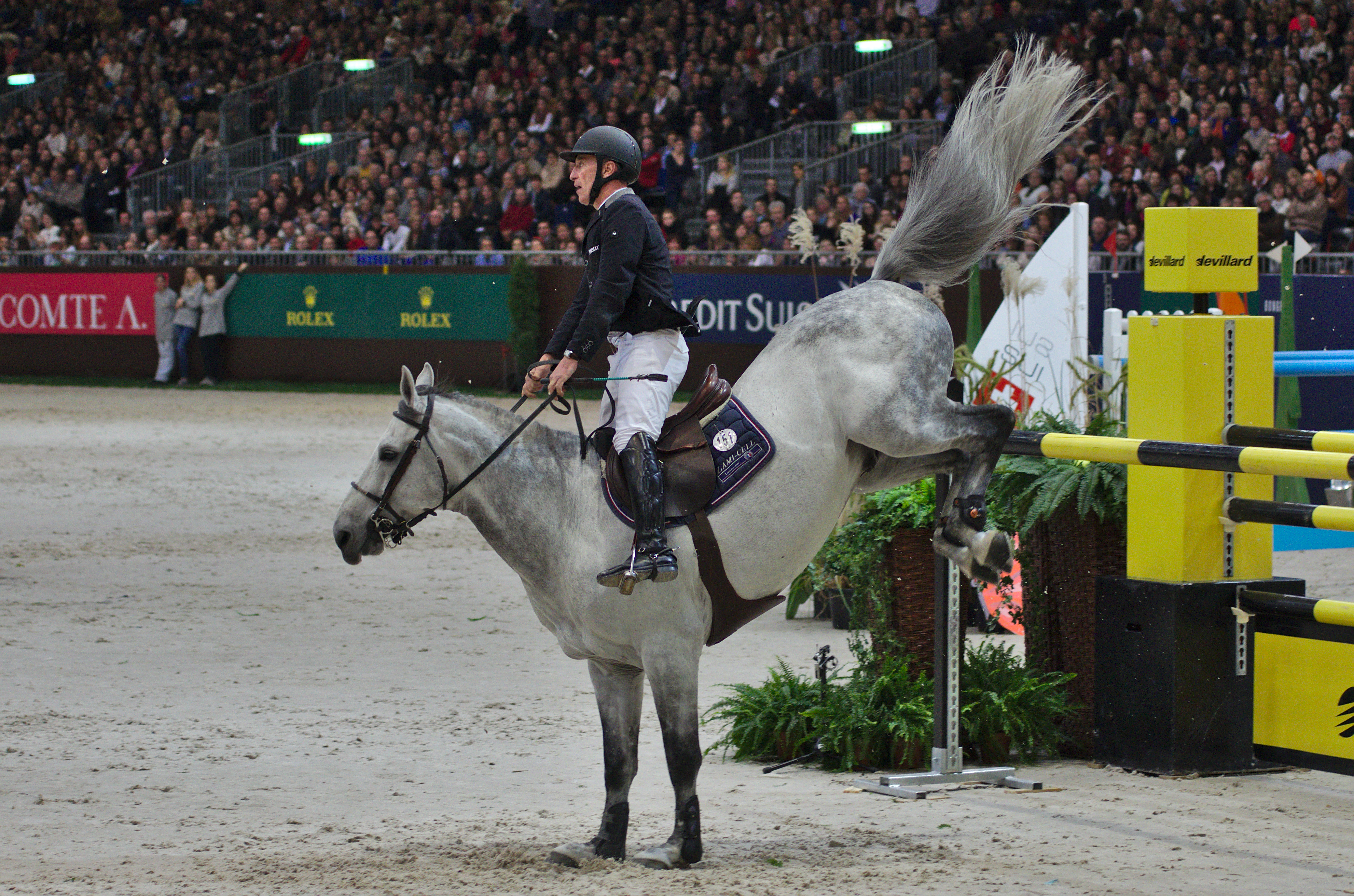 54eme CHI de Genève - 20141213 - Prix Credit Suisse - Roger Yves Bost et Pégase du Murier